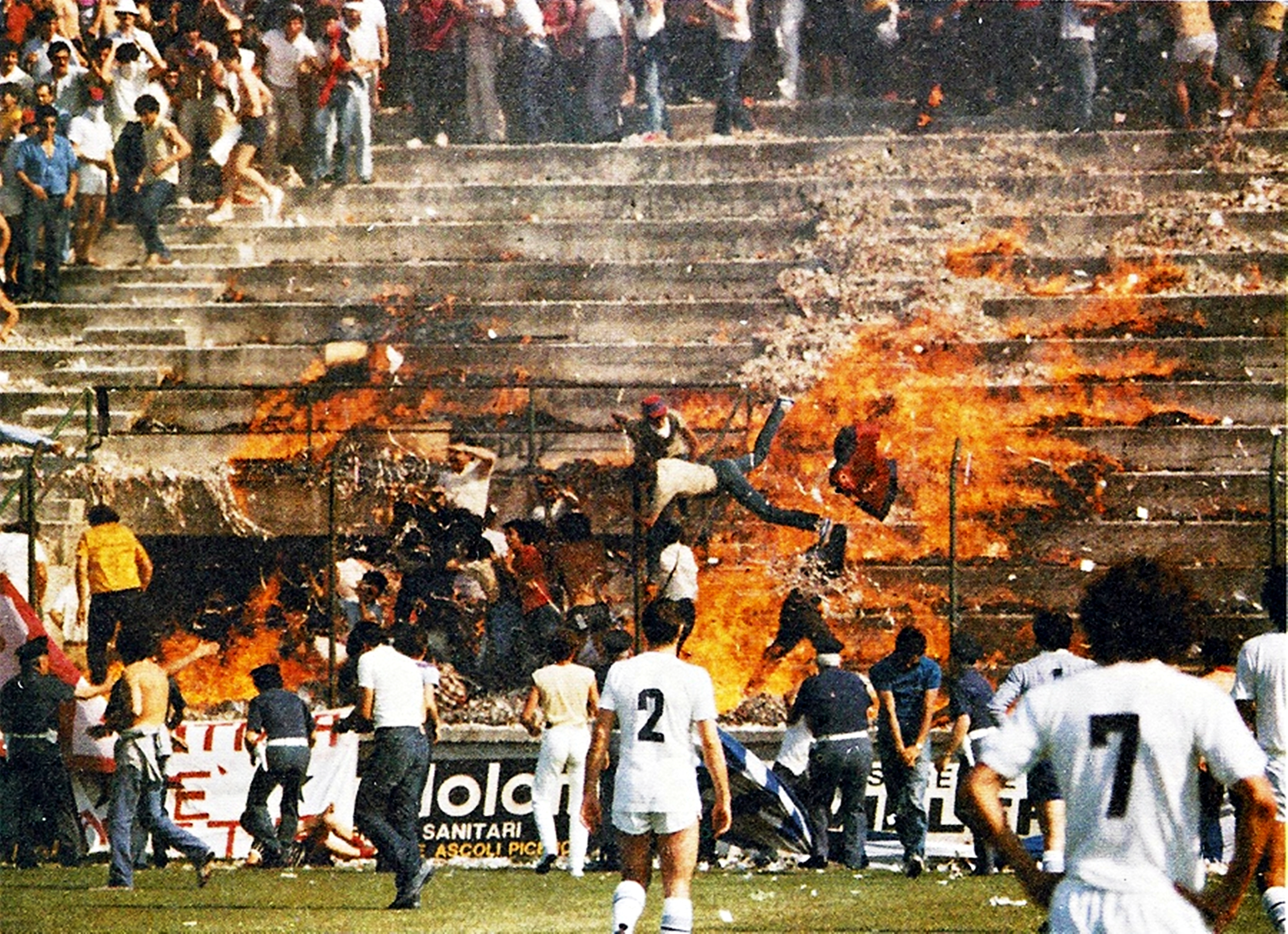 Le vaste dimensioni del "Rogo": decine di tifosi della Sambenedettese , instintivamente, scavalcarono la rete di recinzione che delimitava la gradinata sud con il terreno di gioco.